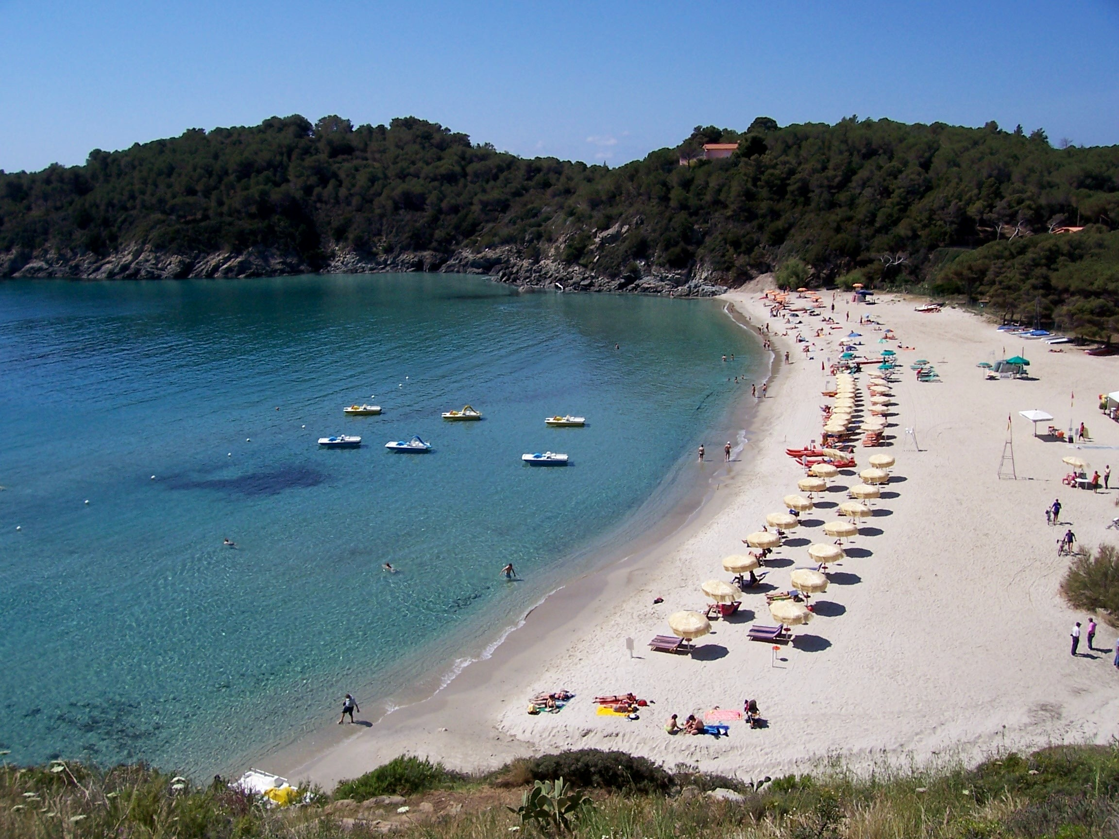 Fetovaia, Campo nell'Elba, Toscana, Italia